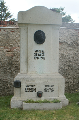 Wiener Zentralfriedhof-Vinzenz Chiavacci